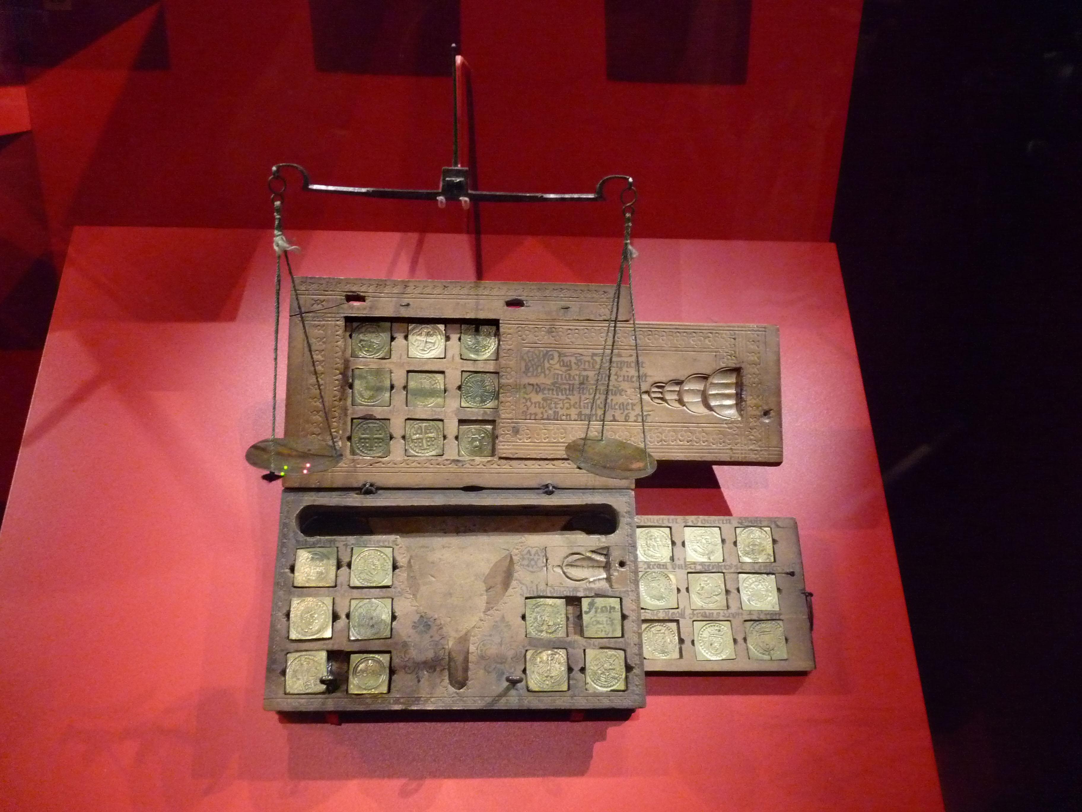 Boîte de changeur, 1655, Musée historique de Strasbourg